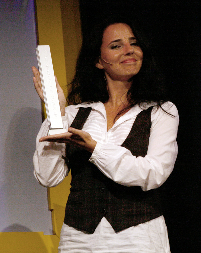 Nadja Maleh bei der Verleihung des Österreichischen Kabarettpreises 2010 im Vindobona in Wien.